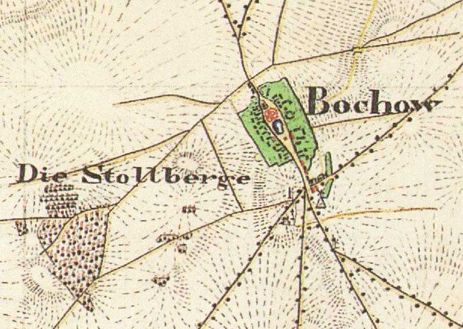 Bochow, Ortsteil von Groß Kreutz, Lkr. Potsdam-Mittelmark, Brandenburg, Urmesstischblatt 3642 Lehnin von 1839